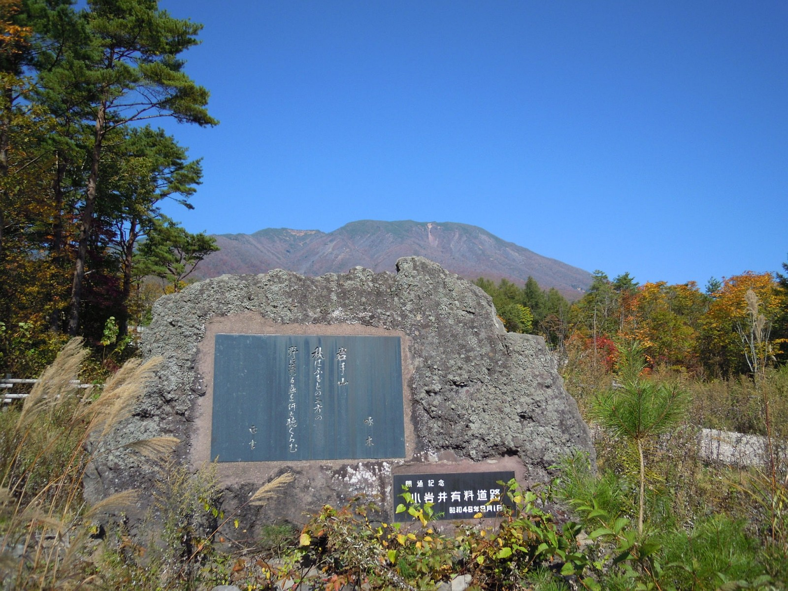 岩手県岩手郡雫石町にある小岩井有料道路の開通（全通）記念碑。背後は秋の岩手山